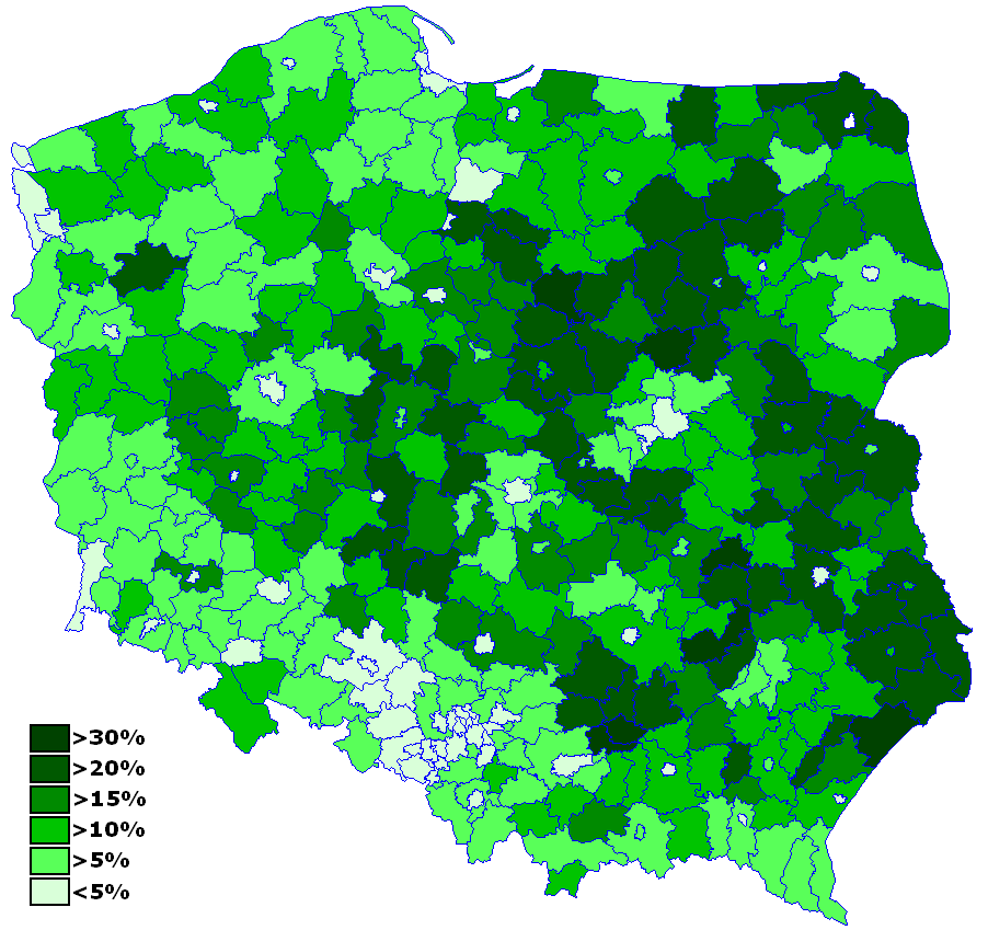 Polish parliamentary election, 2007 - Polish People's Party votes by counties POL: Wybory parlamentarne w Polsce w 2007 roku - wyniki Polskiego Stronnictwa Ludowego w poszczególnych powiatach